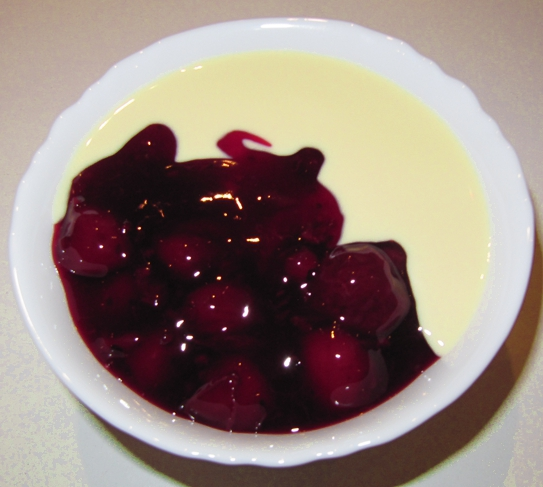 Rote Grüze, Hamburg, mit Vanillesauce